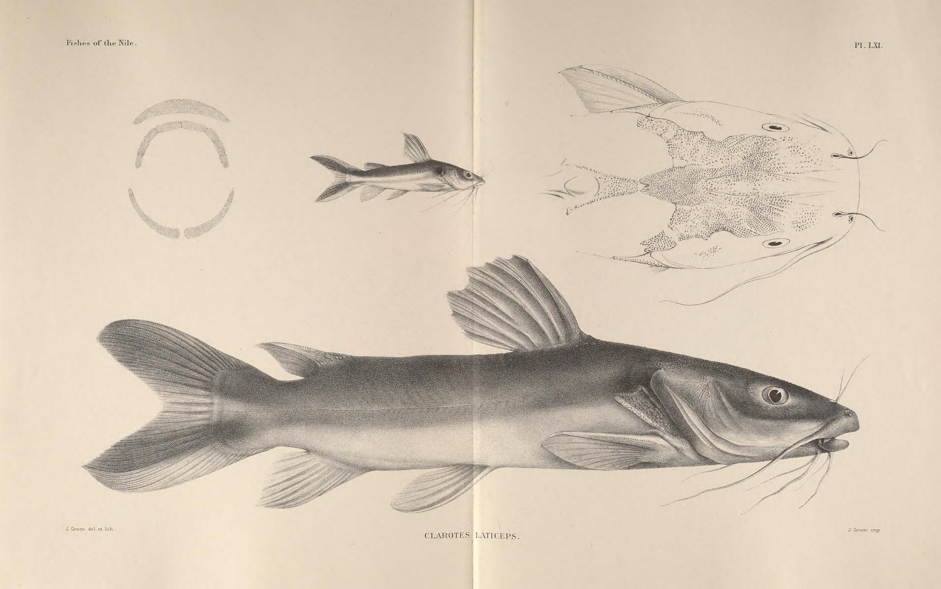 Clarotes laticeps